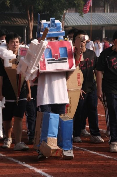 國立台南二中 - 運動會進場變裝秀